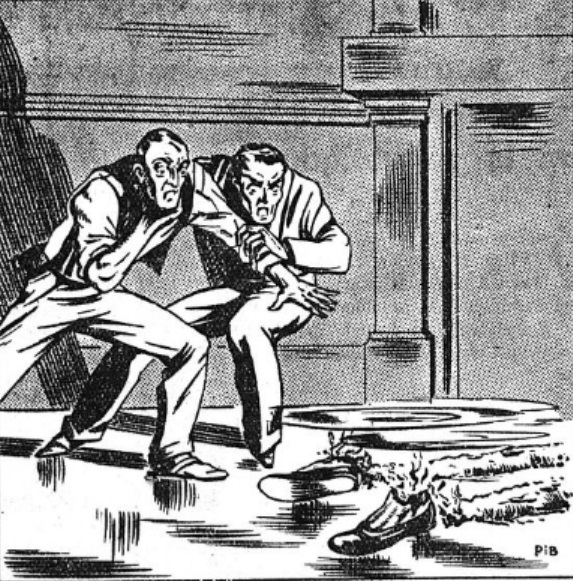 Illustration du roman-feuilleton Les Drames de Paris publié dans le quotidien Le Matin.